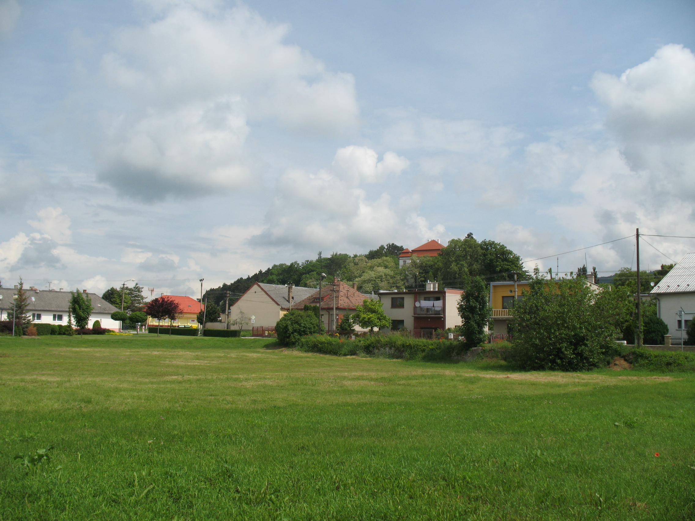 Vágluka